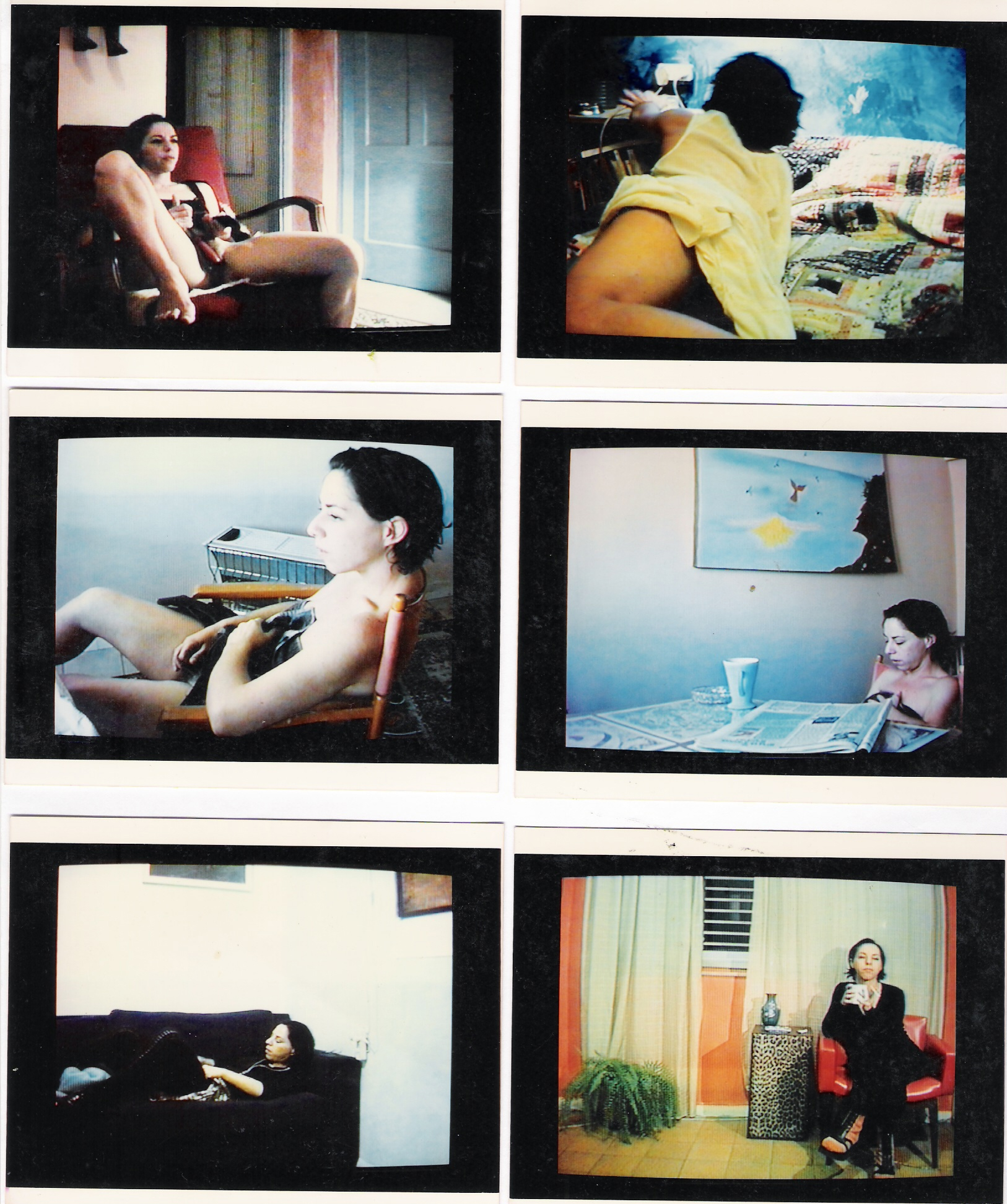 עבודה של גליה יהב